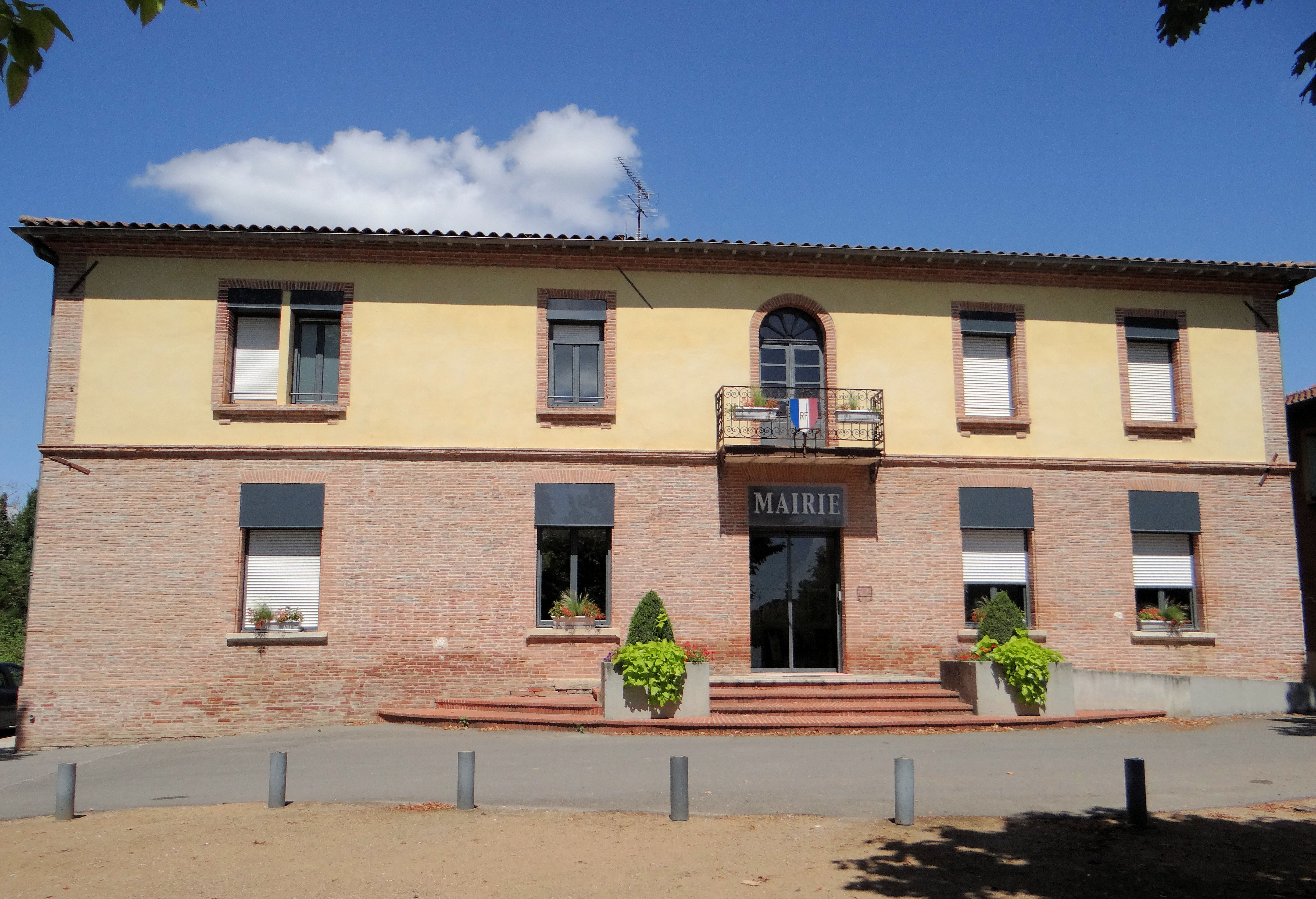 Villebrumier - Mairie